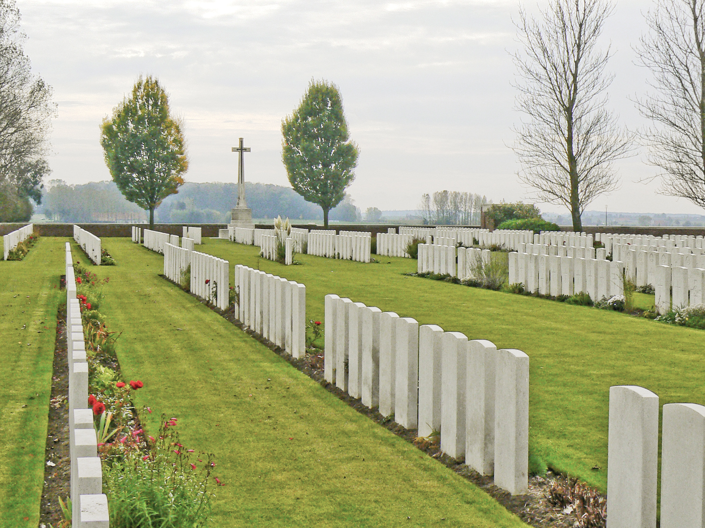 Overzicht begraafplaats.